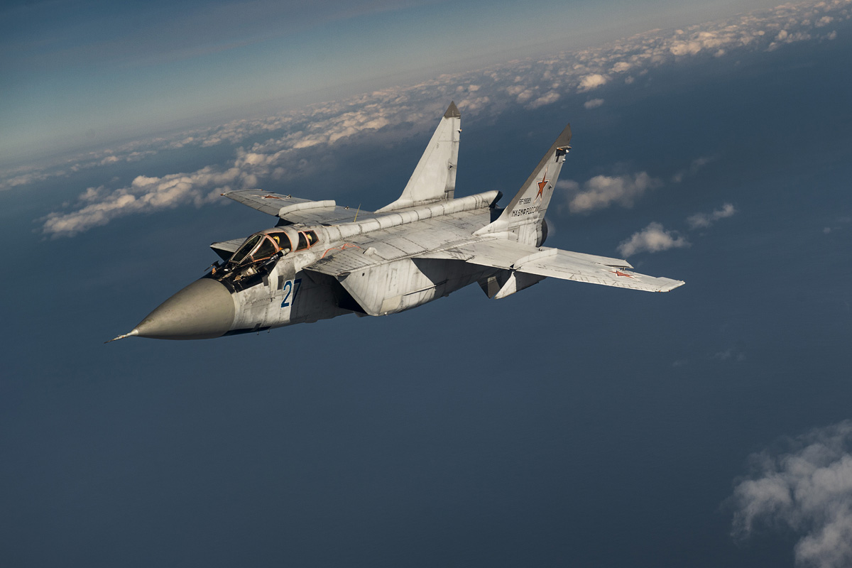 На Камчатке истребители МиГ-31 ТОФ отработали перехват крылатой ракеты условного противника.